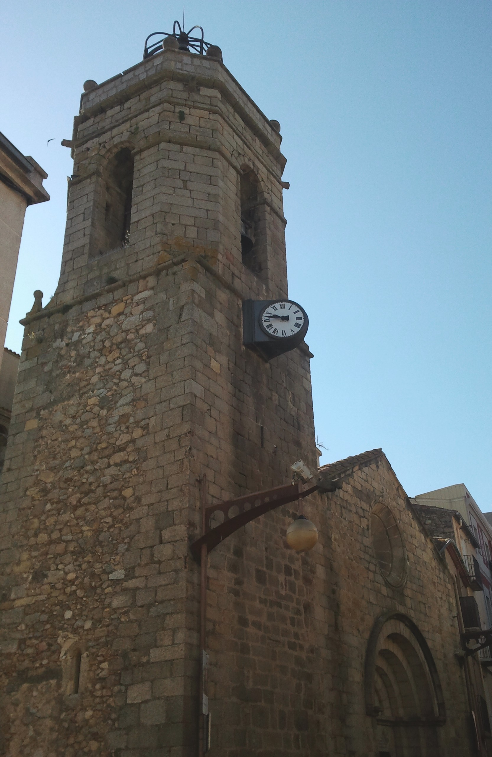 Façade de Santa Maria de la Jonquera